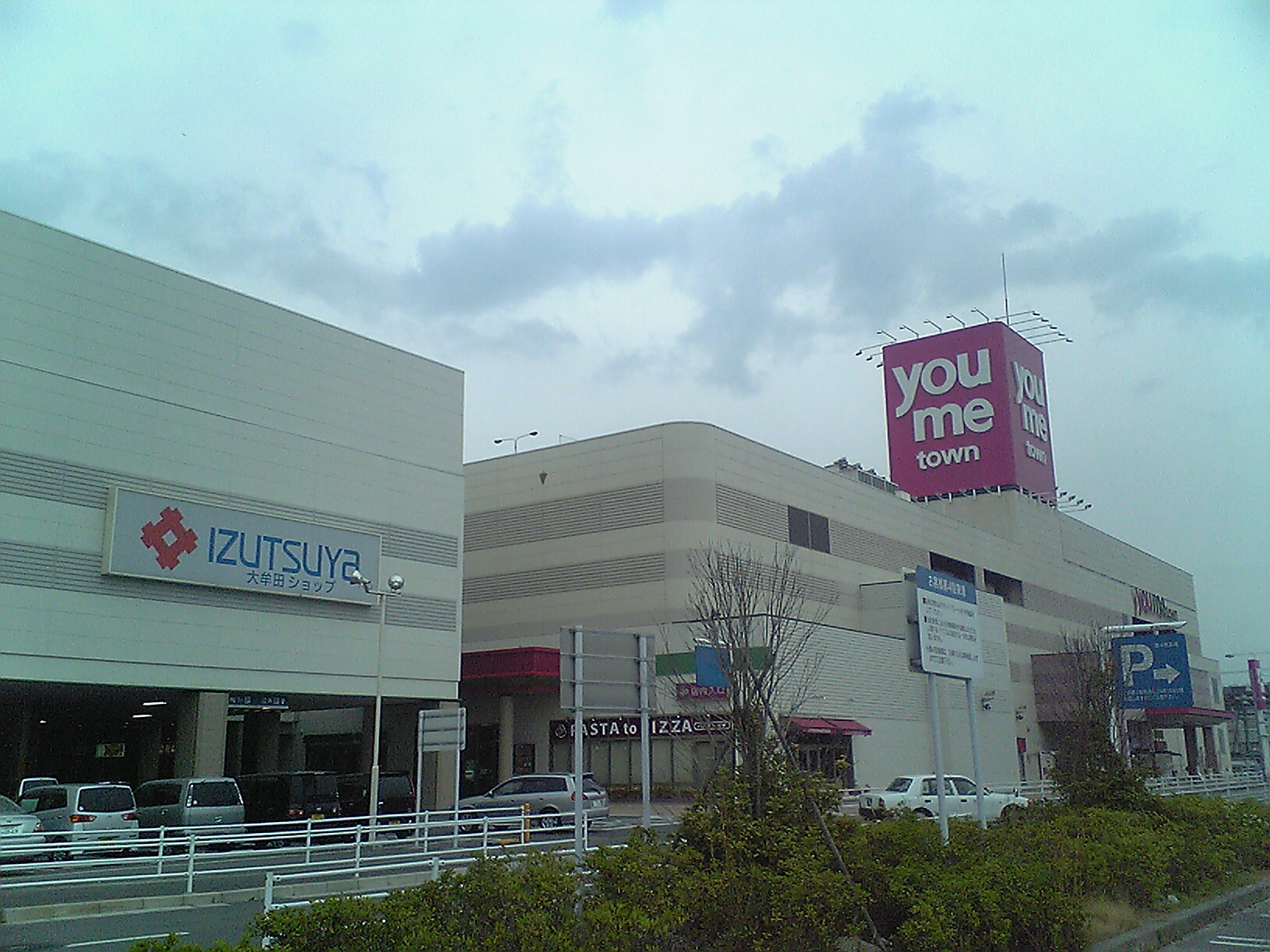 福岡県大牟田市にある、ゆめタウン大牟田